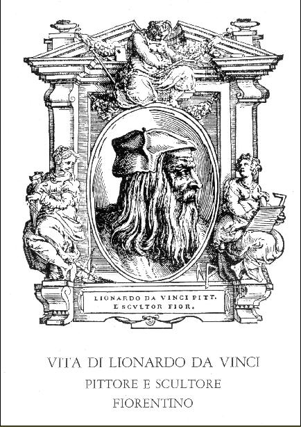 Titelblad Vite van Giorgio Vasari, 1550